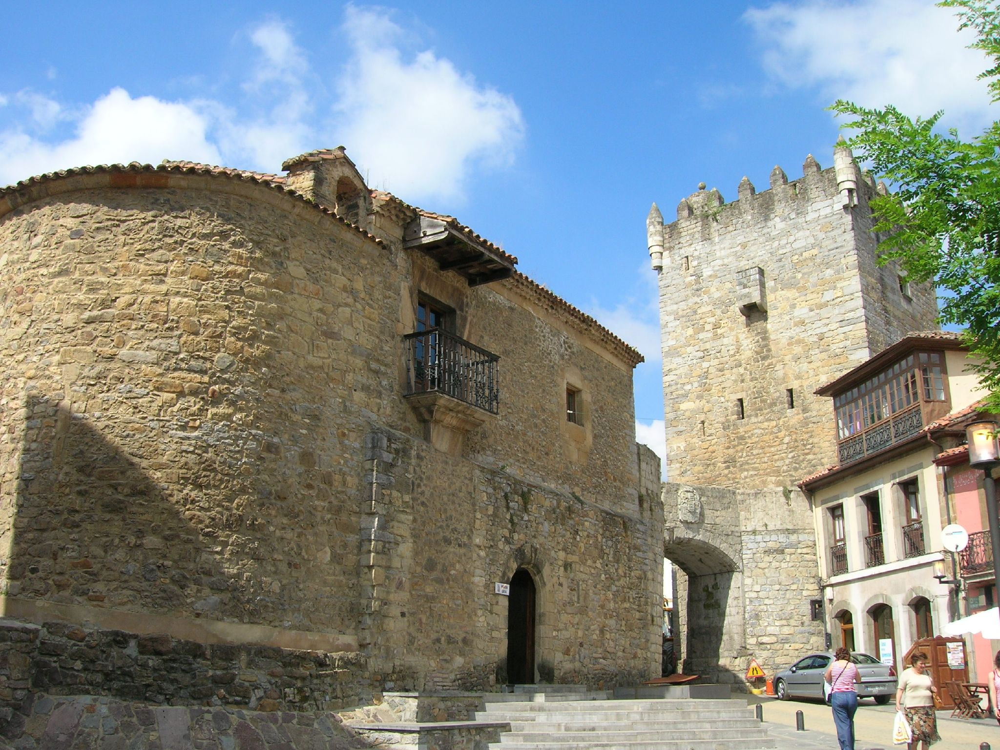 Torre y palacio de los Valdés Salas, en dónde se ubica el museo prerrománicoSalas